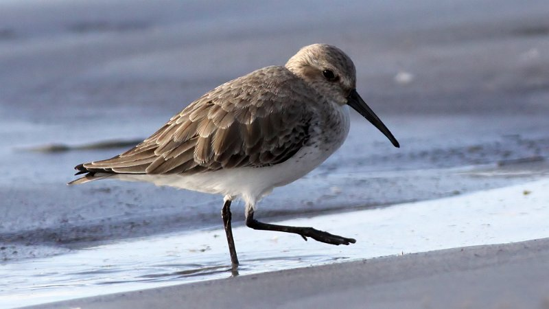 Dunlin (Calidris alpina)